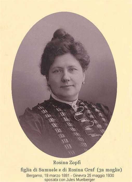 Rosina Zopfi figlia di Samuele e della terza moglie Rosina Graf